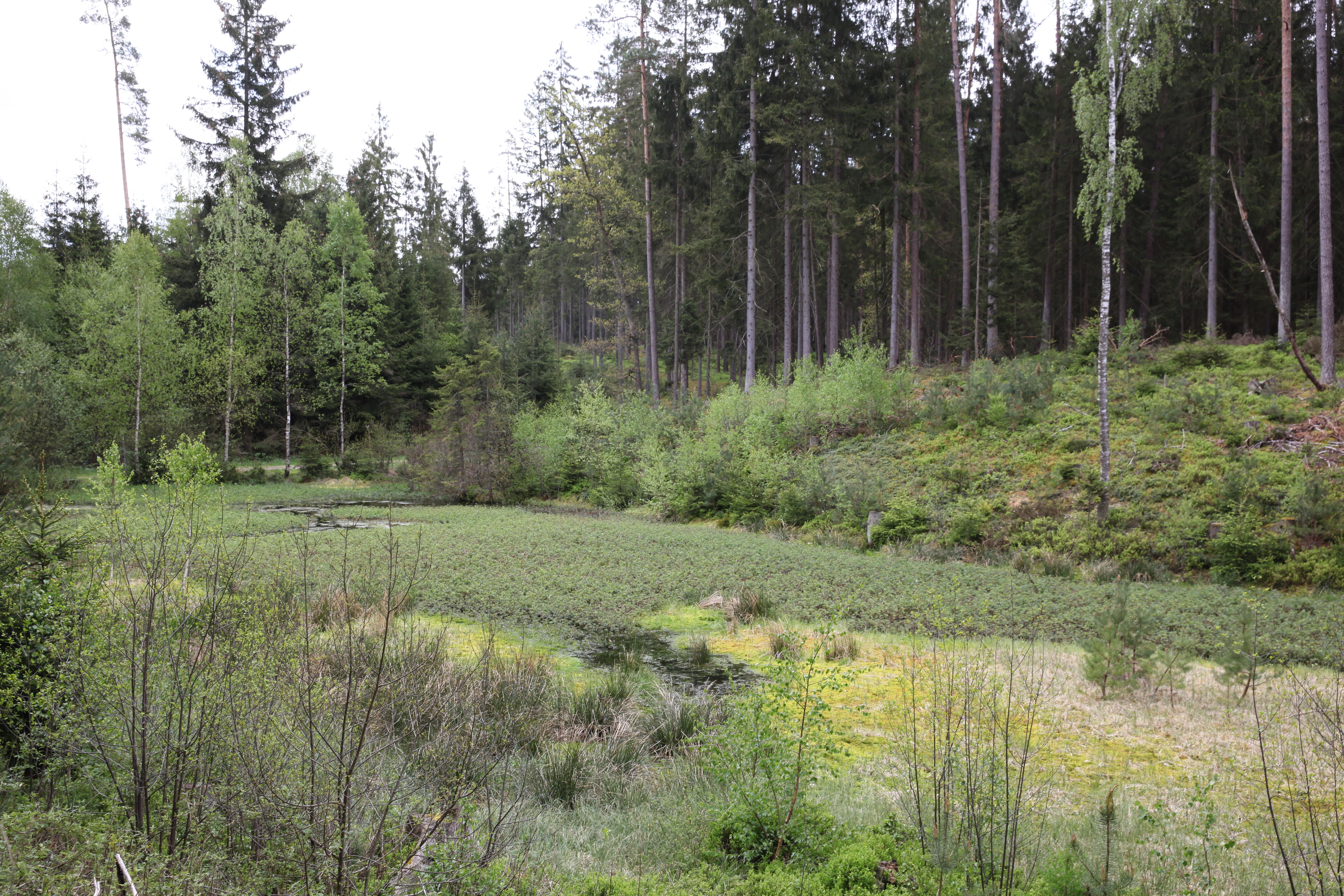 Röstenteich im Rottenbacher Forst